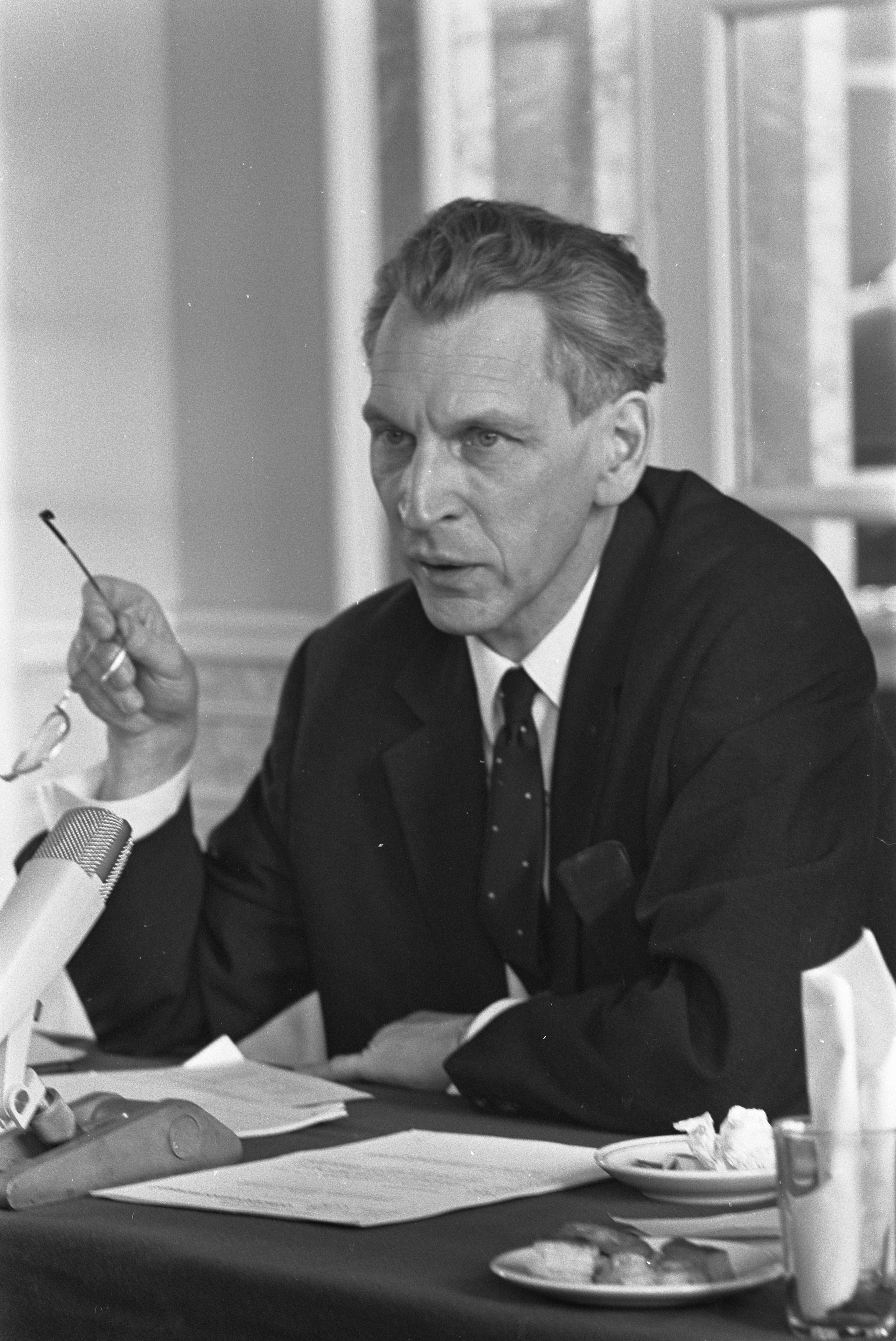 Collectie / Archief : Fotocollectie Anefo Reportage / Serie : [ onbekend ] Beschrijving : Jaarlijkse persconferentie Nederlandse Orkest-stichting, de heer Marius Flothuis (artistiek leider) (kop) Datum : 4 april 1967 Trefwoorden : leiders, persconferenties Fotograaf : Nijs, Jac. de / Anefo Auteursrechthebbende : Nationaal Archief Materiaalsoort : Negatief (zwart/wit) Nummer archiefinventaris : bekijk toegang 2.24.01.05 Bestanddeelnummer : 920-2059